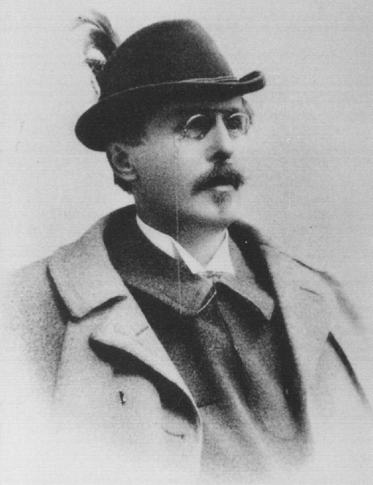 Karl May (* 1842; † 1912)